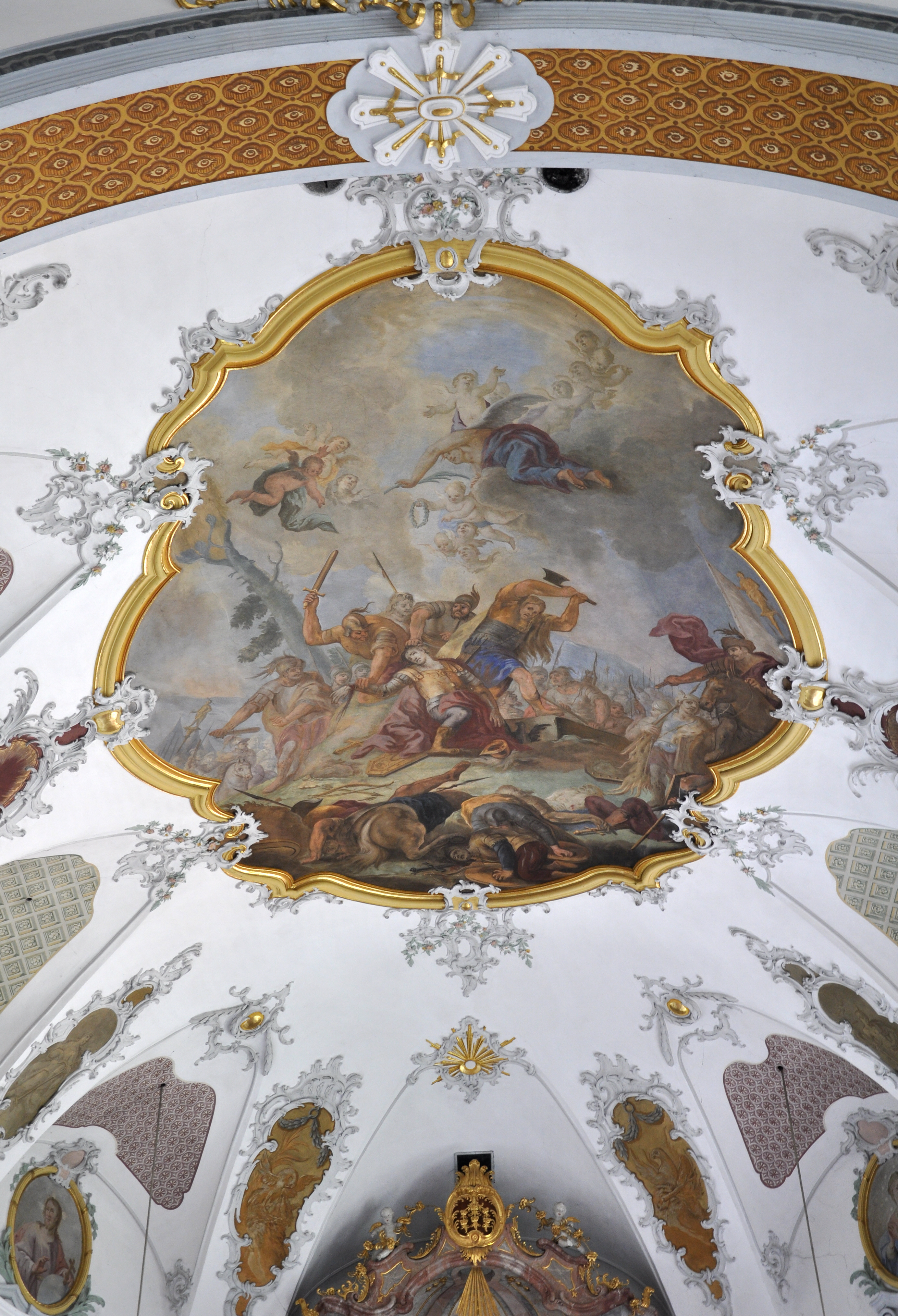 Andreas Meinrad von Ow: Deckengemälde im Altarraum Martyrium des hl. Oswald (Der gefangene Oswald wird niedergemetzelt), 1778 oder 1779 Pfarrkirche St. Oswald, Otterswang Bad Schussenried, Landkreis Biberach, Baden-Württemberg